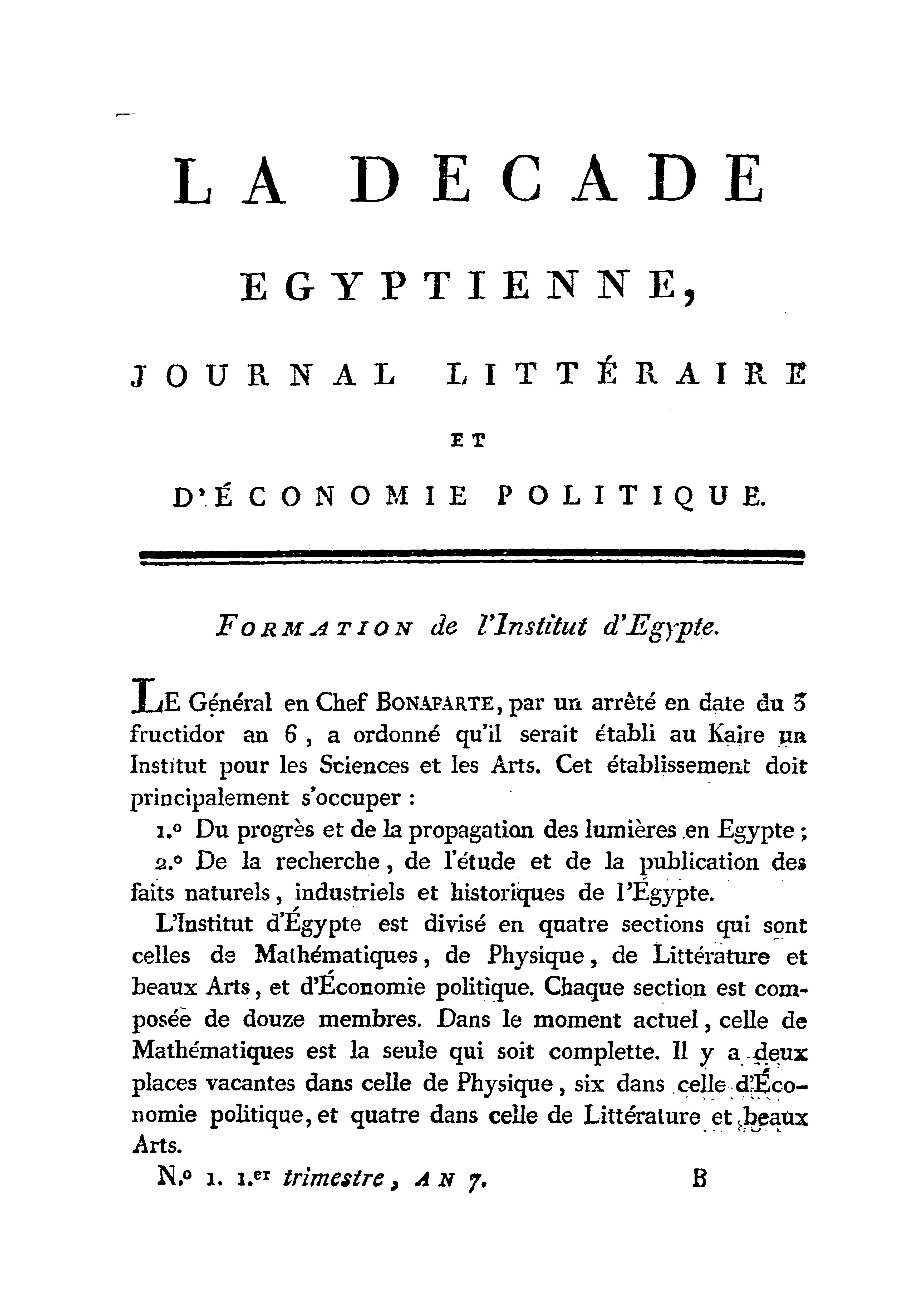 La Décade égyptienne (1798)